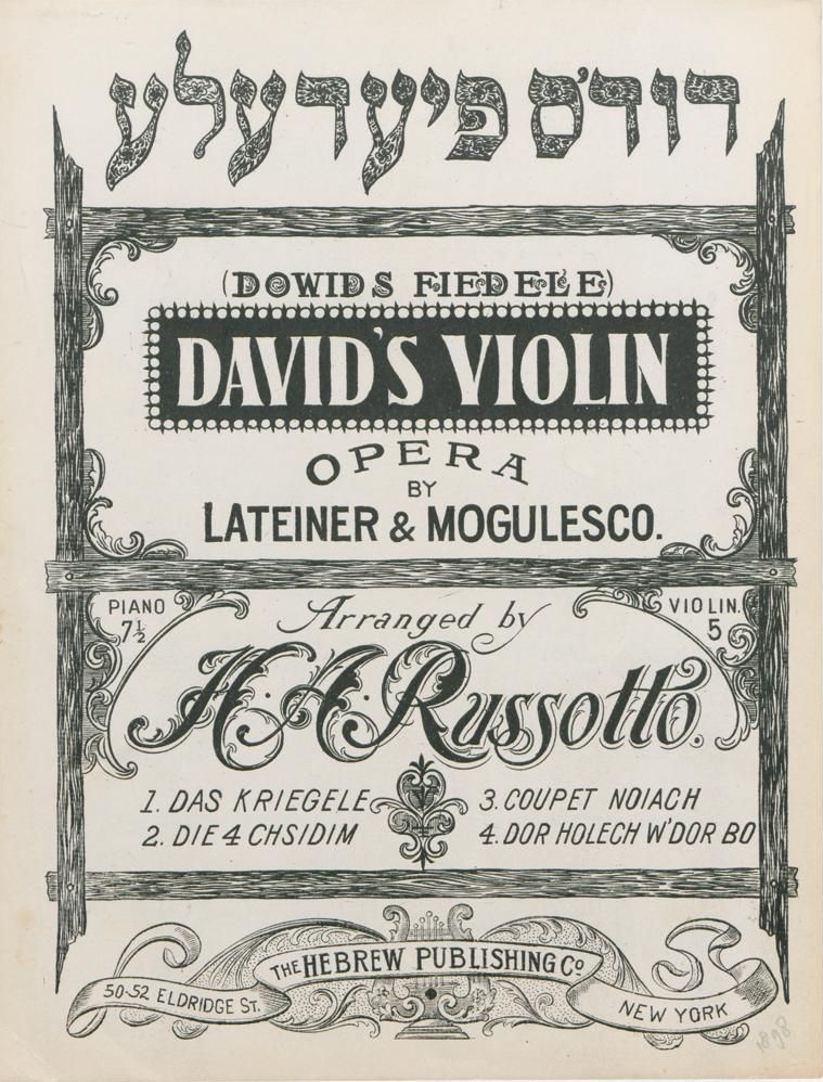 Скрипка Давидаопера Латайнера и Могулеско «Скрипка Давида», партитура